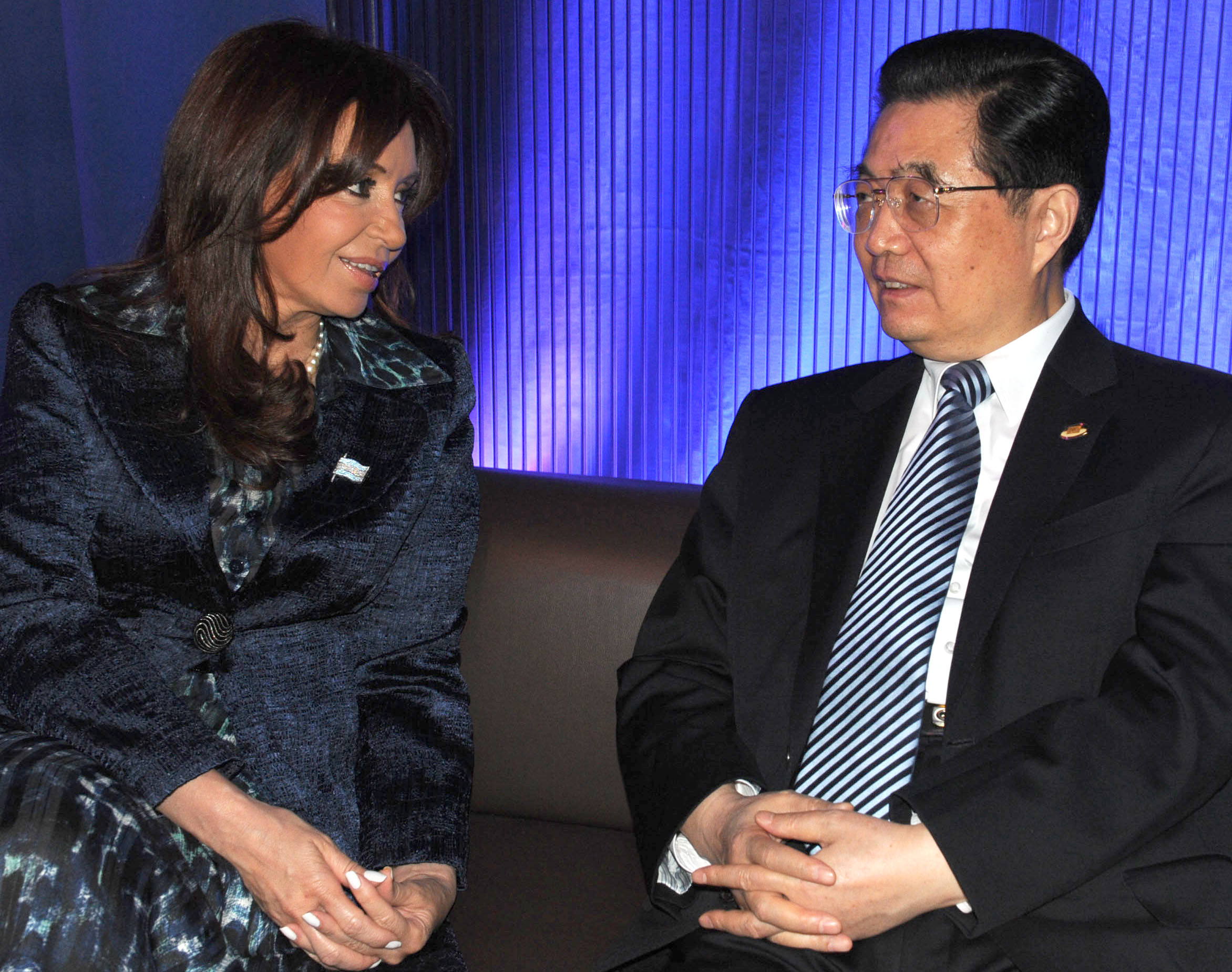 La presidenta Cristina Fernández junto al presidente de la República Popular China, Hu Jintao, en la Cumbre de Seguridad Nuclear de Washington